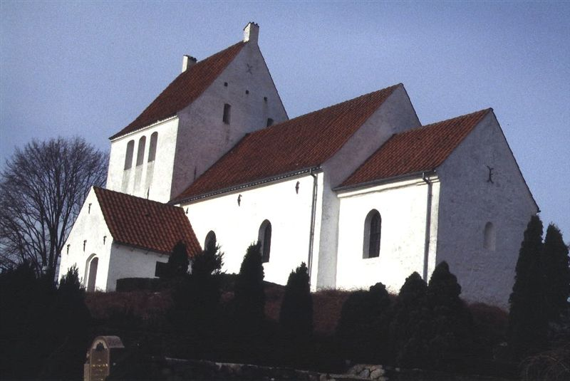 Sønder Asmindrup Kirke i Danmark. Sønder Asmindrup kirke